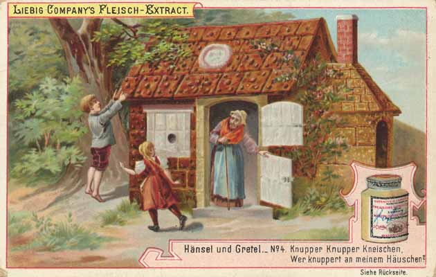 Liebigbild Seriennummer 329 Sanguinettinummer 479 Märchen-Sagen-Fabeln Jahrgang 1896 Hänsel und Gretel (4)